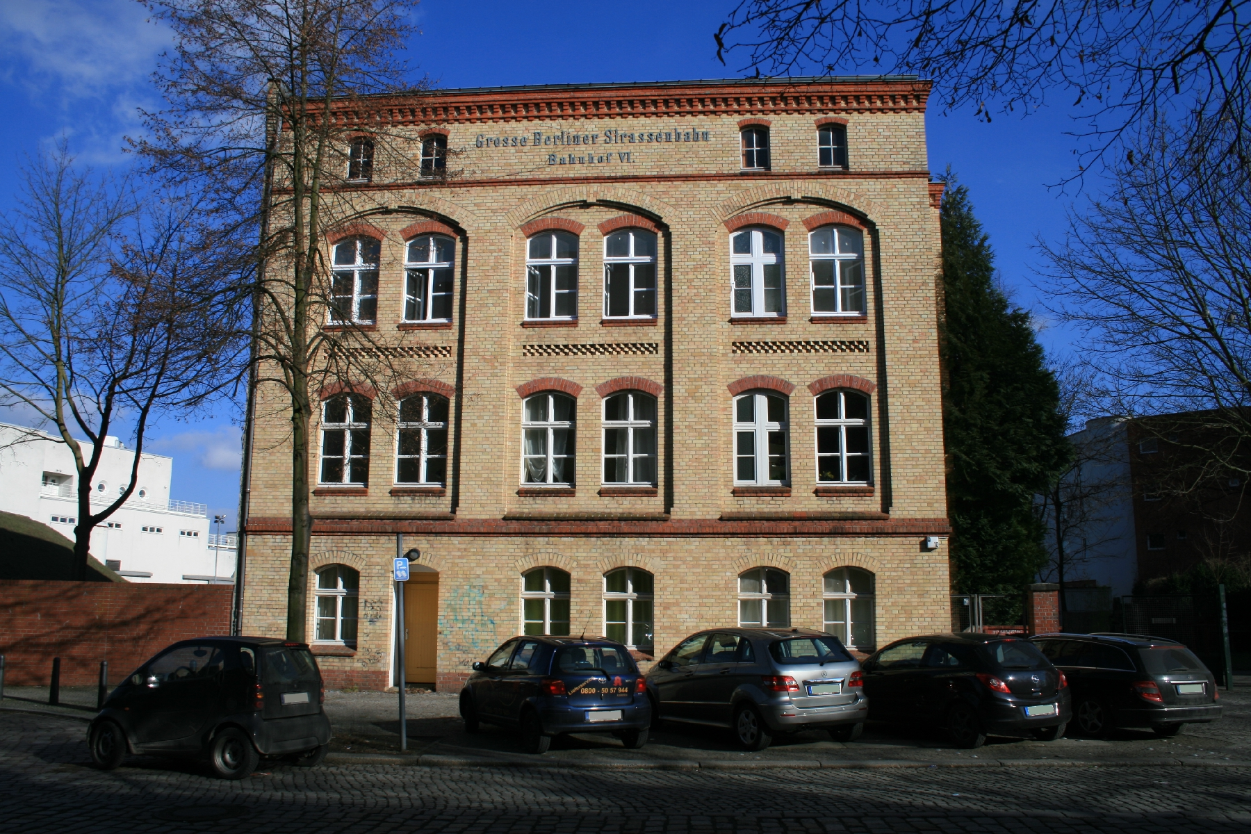 Berlin-Tegel, Schloßstraße 7–10. Verwaltungsgebäude vom eh. Straßenbahnwagendepot.